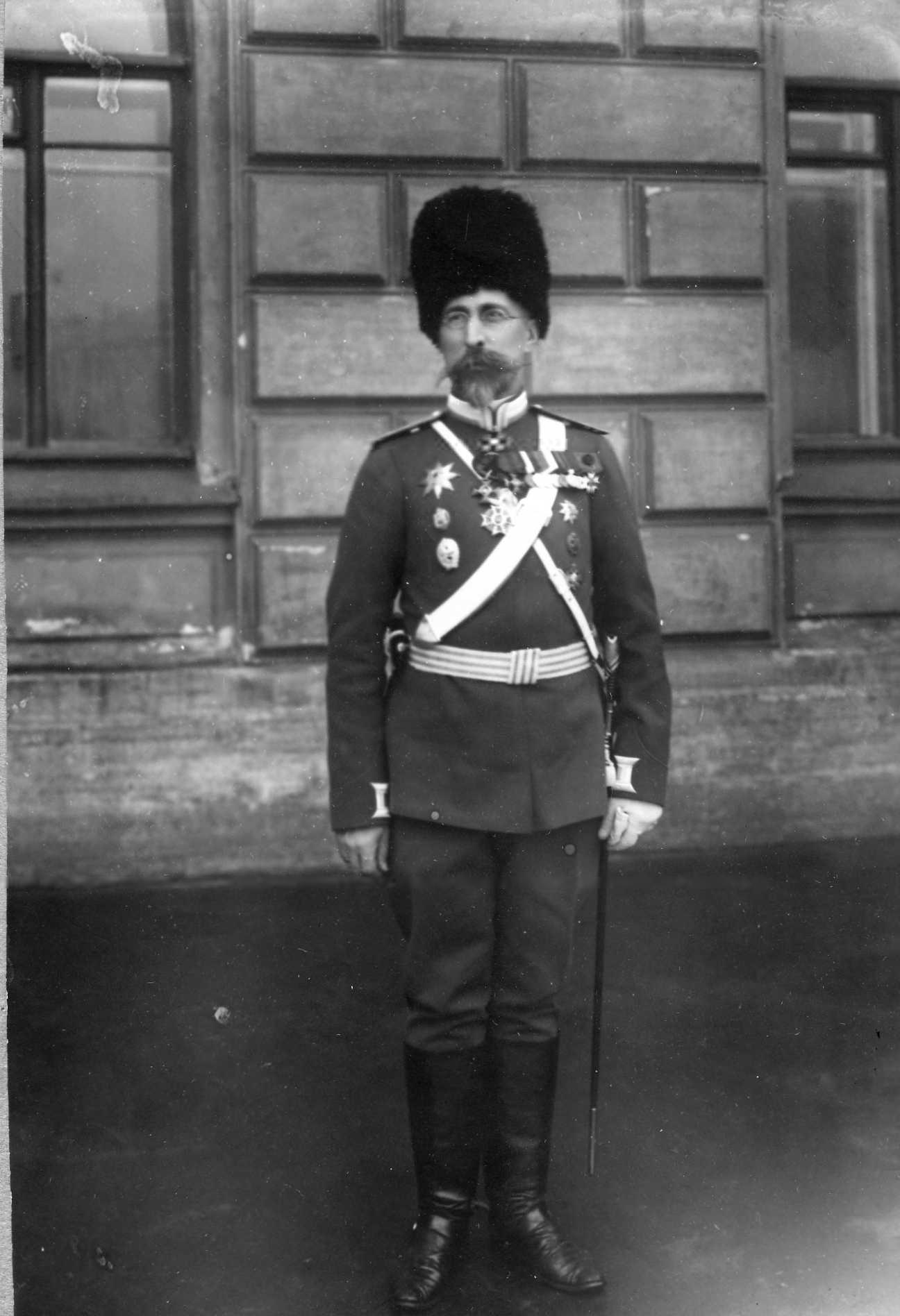 Генерал, атаман Уральского войска Хабалов С.С., в 1916-1917 году командовал войсками ПВО.